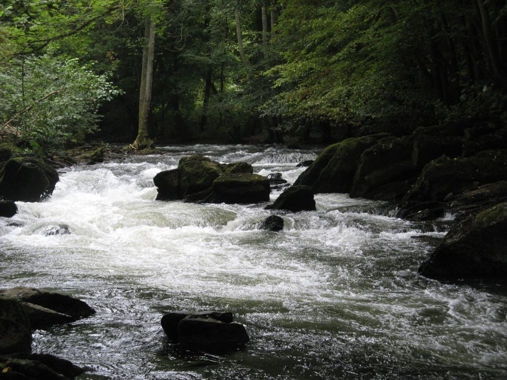 Upper Lesse